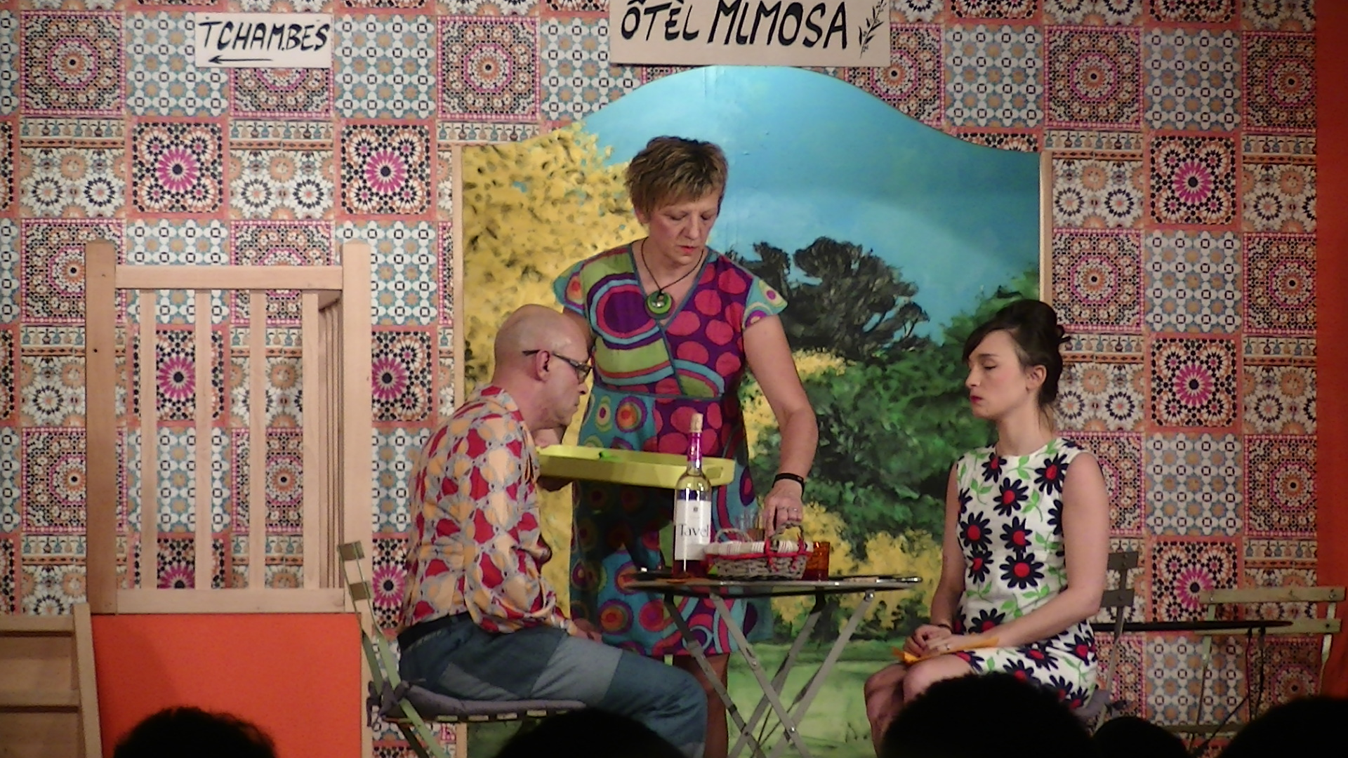 Walon: redjårbaedje di «Pension complète» pa djouwêye pal dramatike di Veskeveye, avou des pancwåtes e walon "ôtèl" eyet "tchambes"